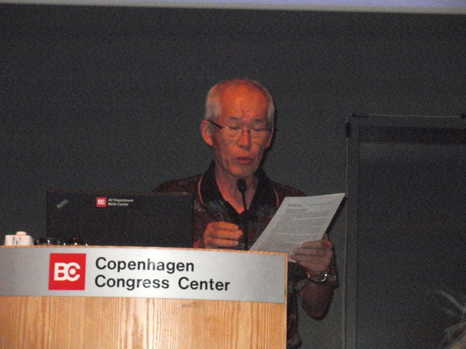 Jasuo Hori dum la kunveno pri Ĝemelaj Urboj, en la UK-96.